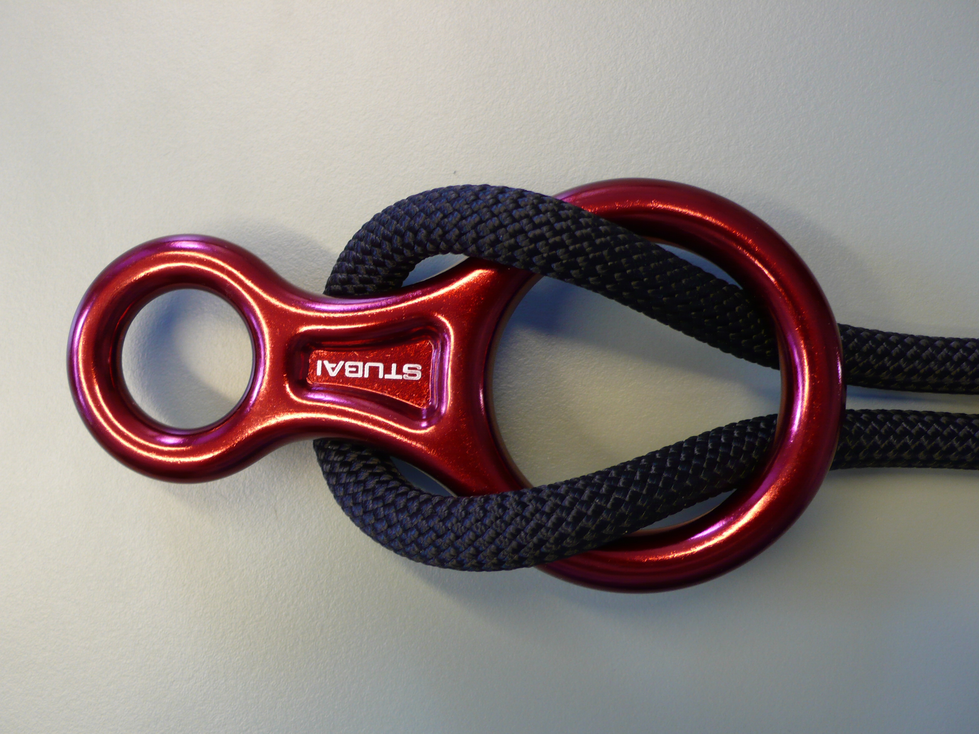 Standard Abseilachter mit Seil